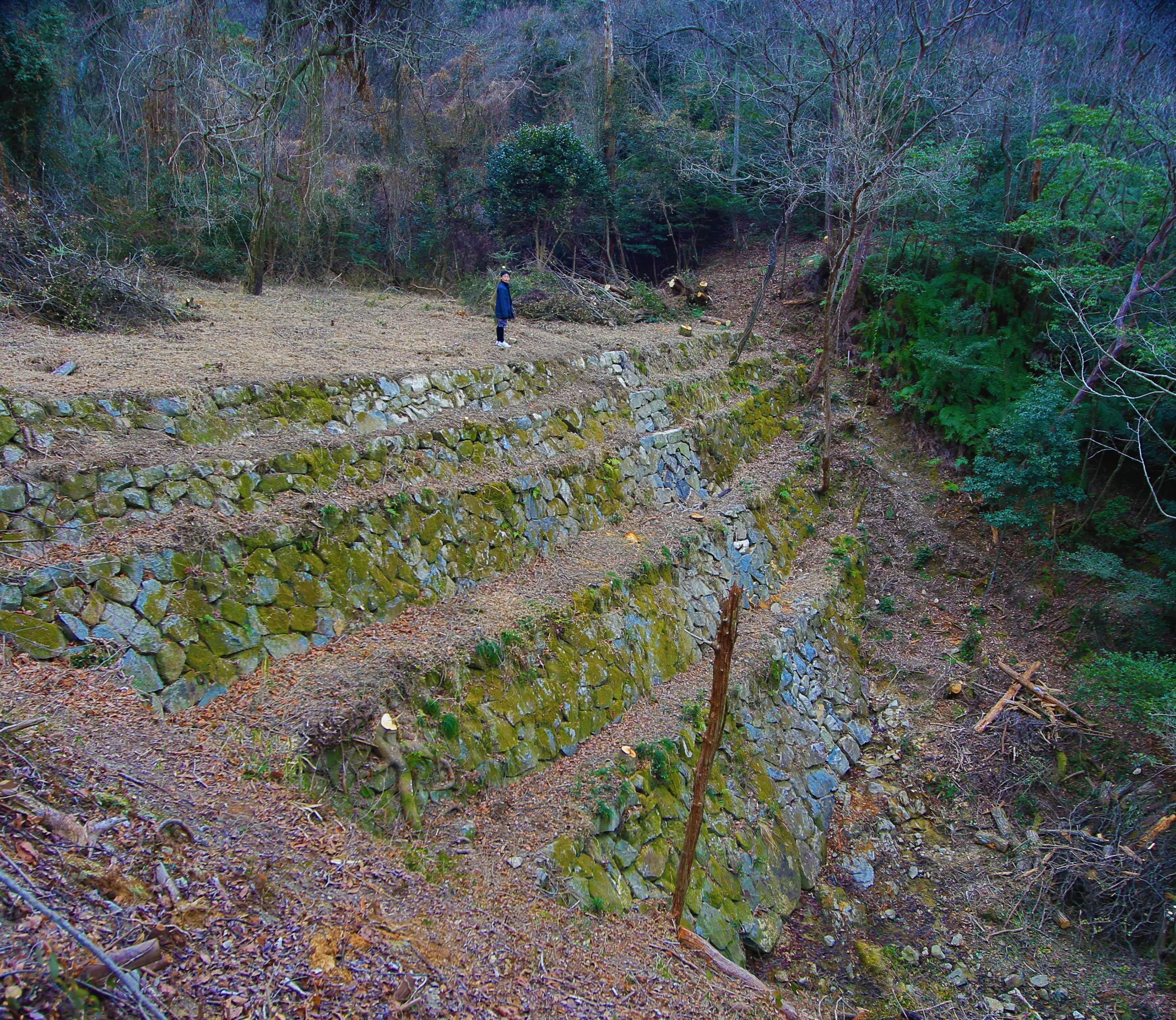 広島県福山市芦田町の第5大谷砂留。2018年5月までは6番砂留とされていた。。右側より見る。上側に比較対象のための人物を配置。5段構造になっているのが分かる